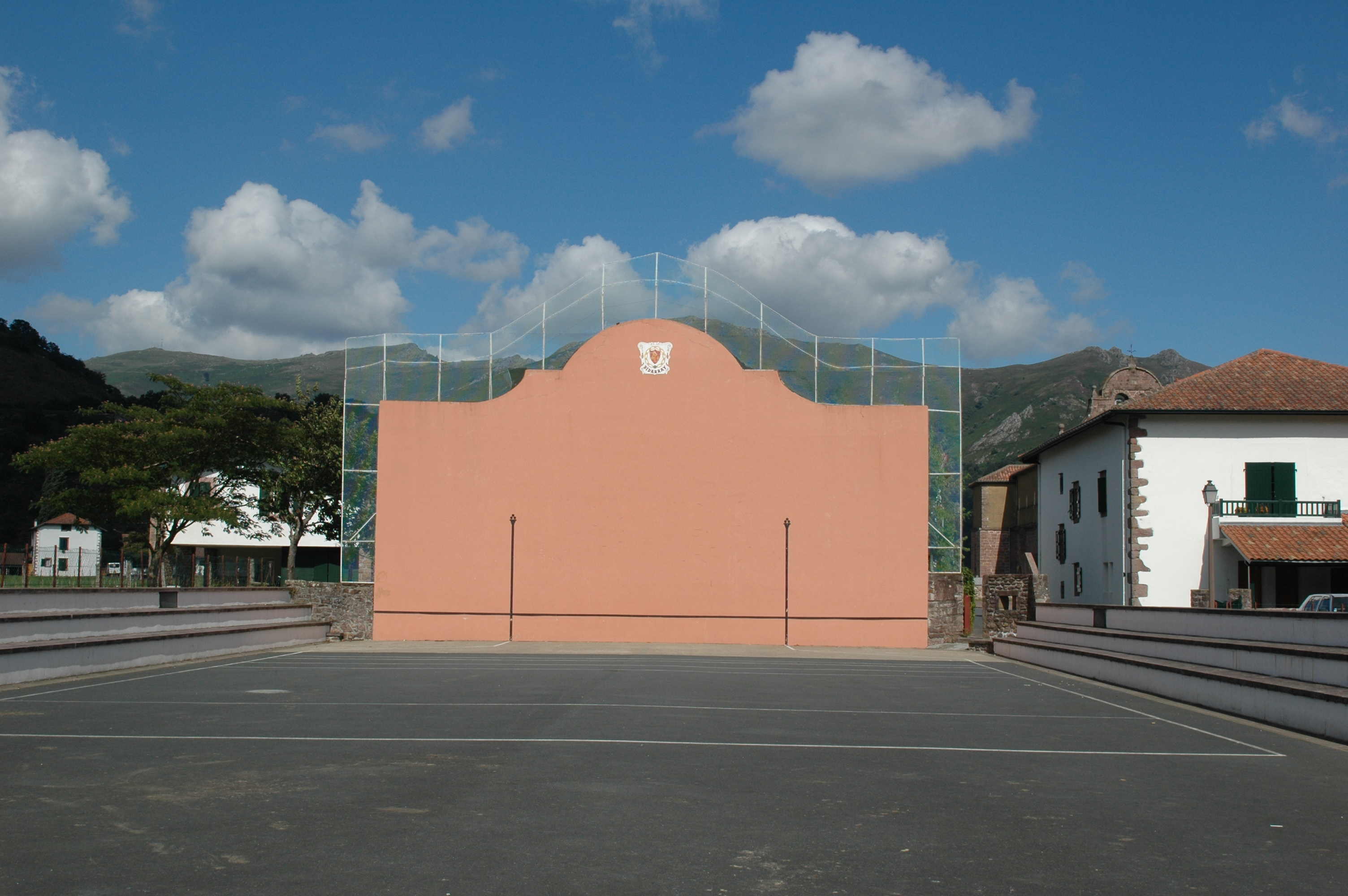 Bidarray, le fronton. Photo prise le 03/08/06 par Harrieta171